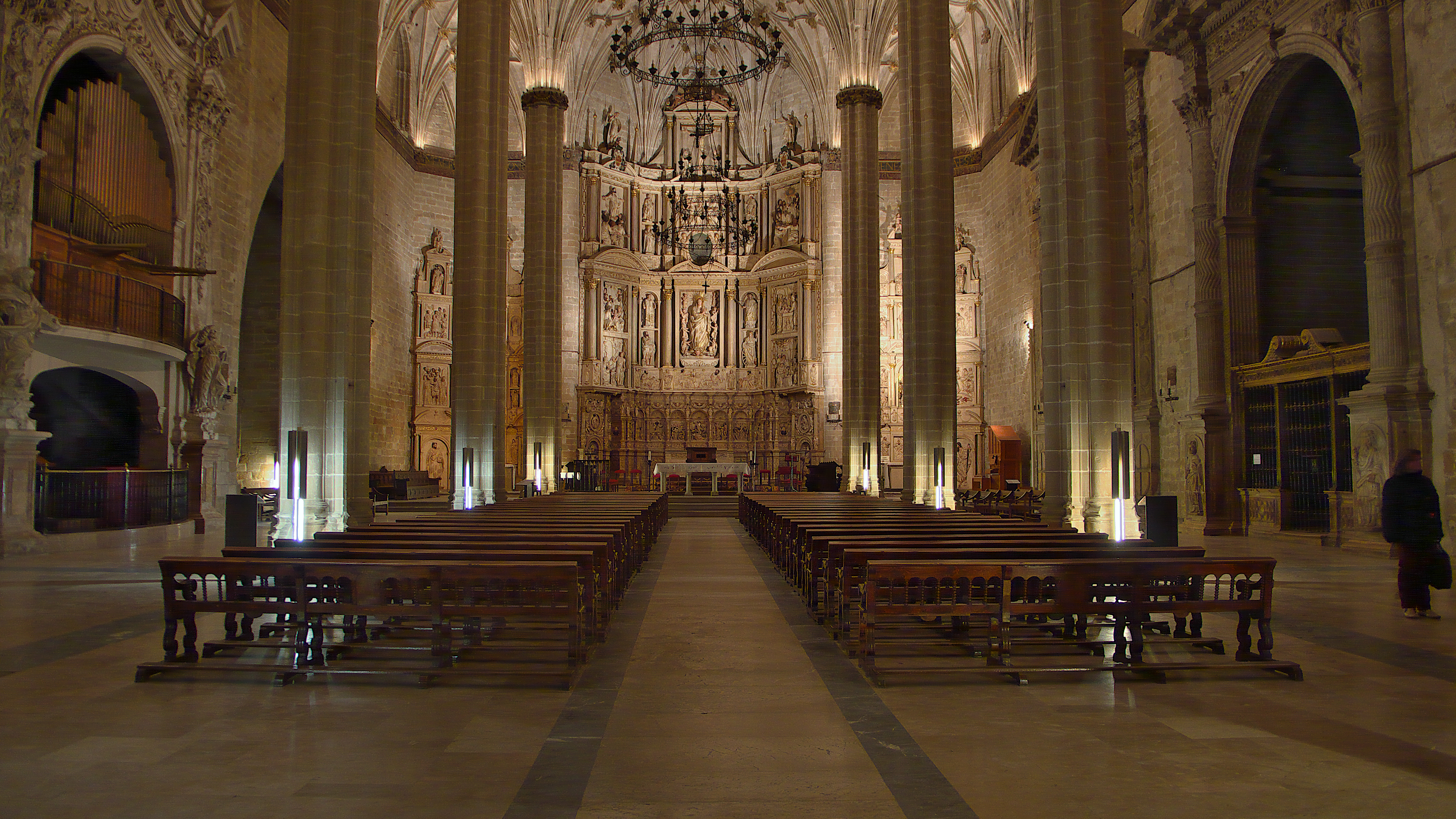 La transparencia de Juan de Segura (1517-1533). Iglesia con la planta de salón más interesante de Aragón.